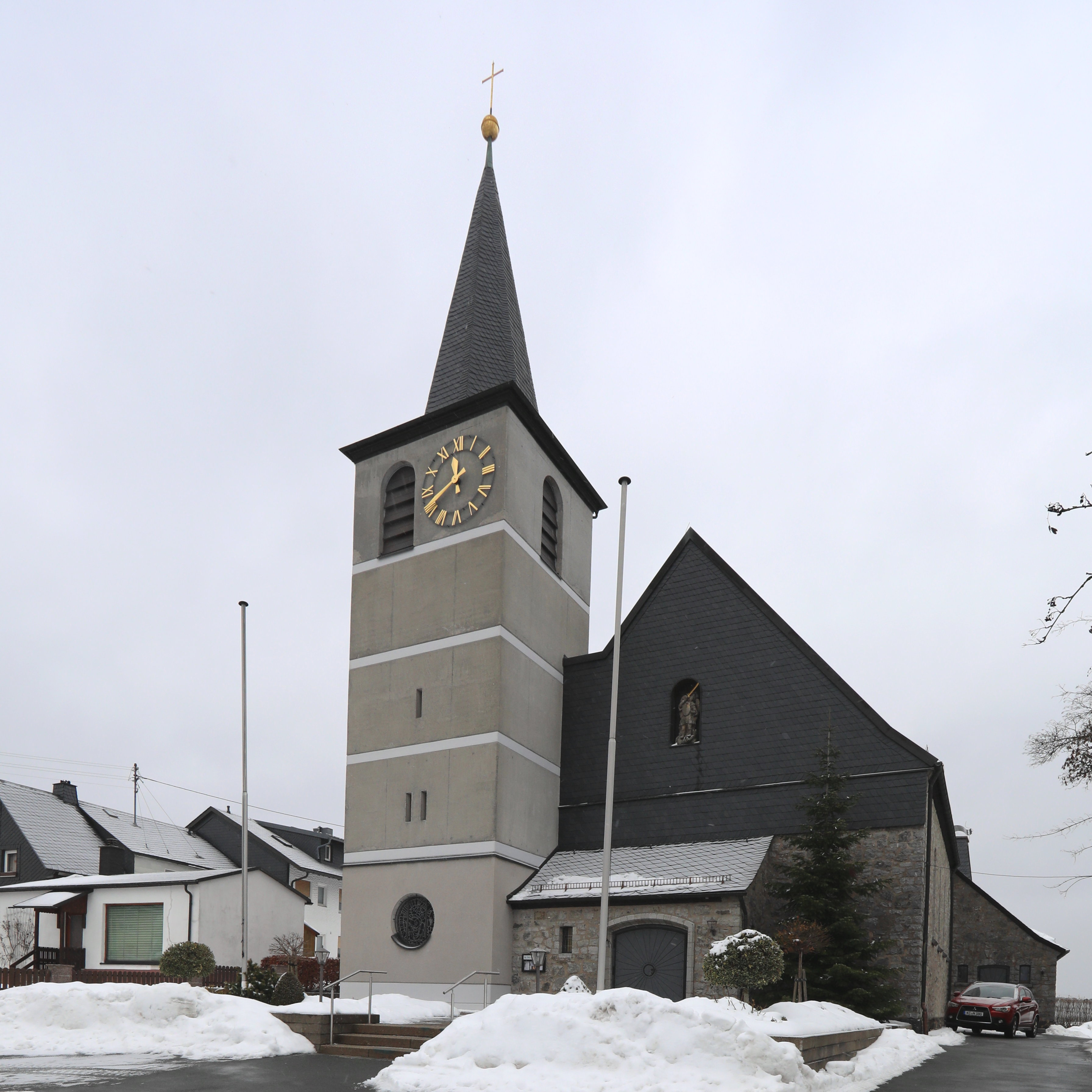 Katholische Kirche St. Michael in Nurn